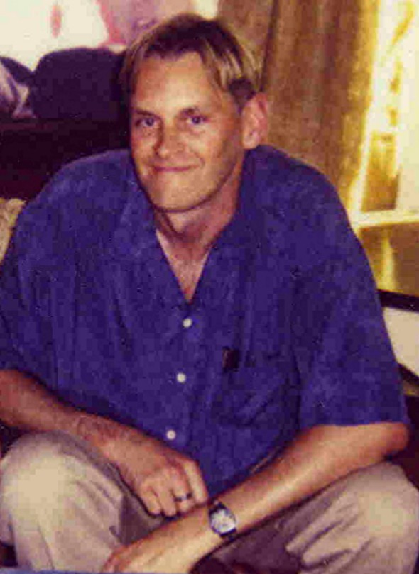 Alexander Stuart